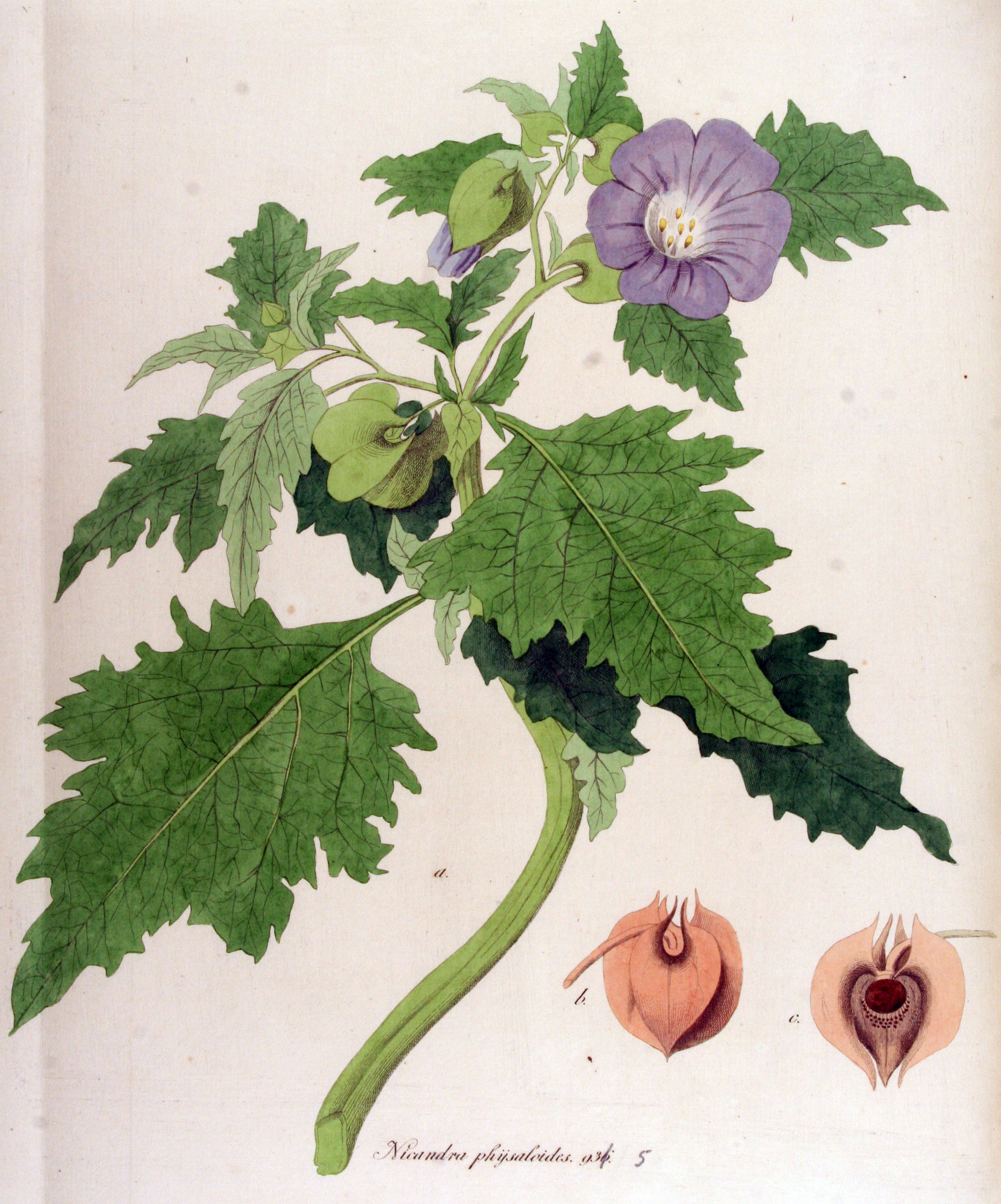 Nicandra physalodes (L.) Gaertn.